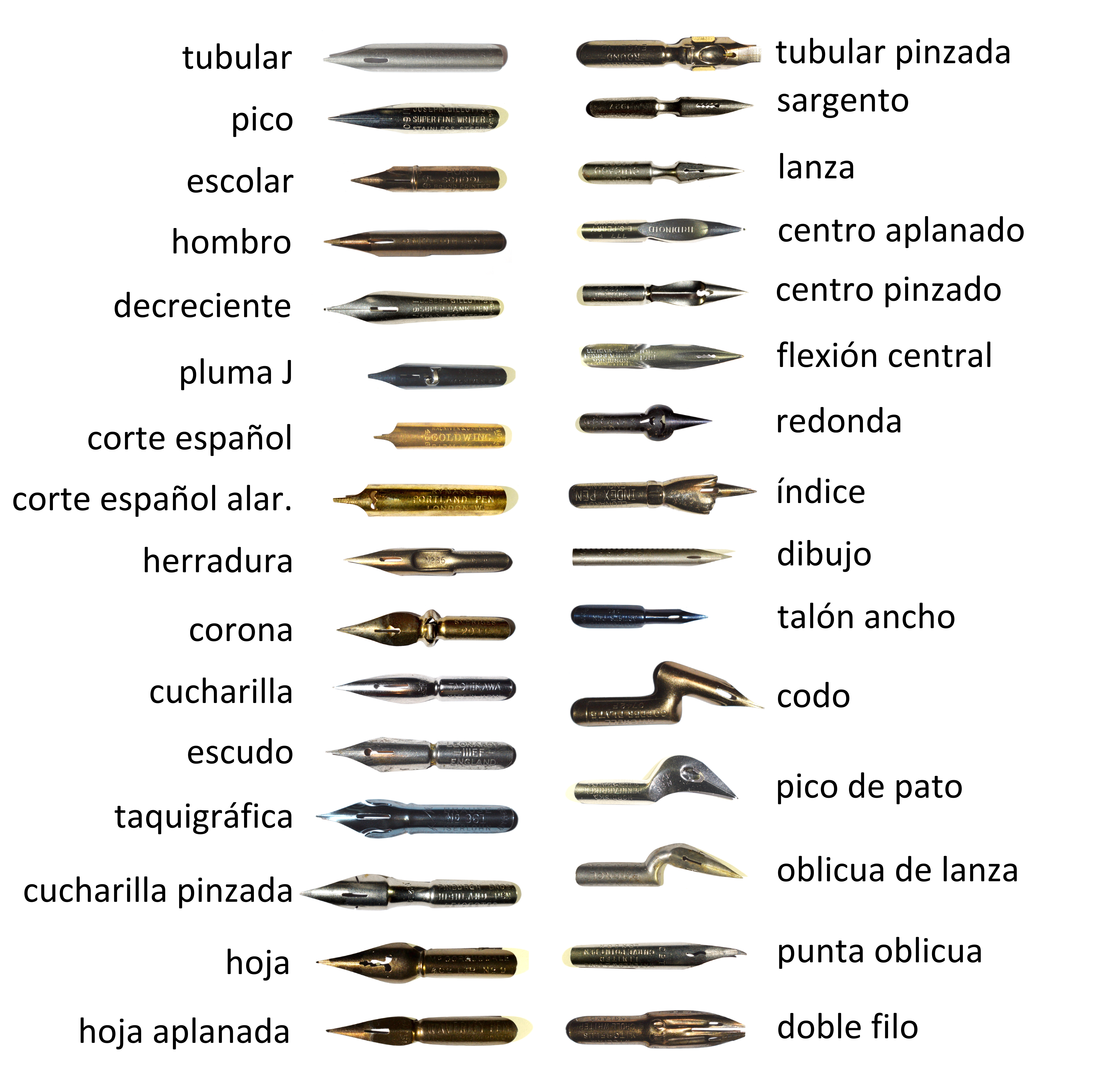 Aquestes són algunes de les formes de plomí, o tremp, més comunes. Hi ha una gran varietat formal de plomes metàl·liques, de manera que aquesta selecció és general i no pretén ser exhaustiva. Aquests tremps es fabricaven —i alguns encara es fabriquen— en moltes altres variants, algunes de les quals poder diferenciar-se molt de les ací mostrades. A més, les plomes de cada forma solien produir-se amb diferents amples i tipus de punta, així com diferents nivells de flexibilitat; així doncs, hi poden haver centenars de combinacions possibles. Les plomes específiques que es mostren ací per a cada forma poder veure's sota al costat del nom de la forma en castellà.